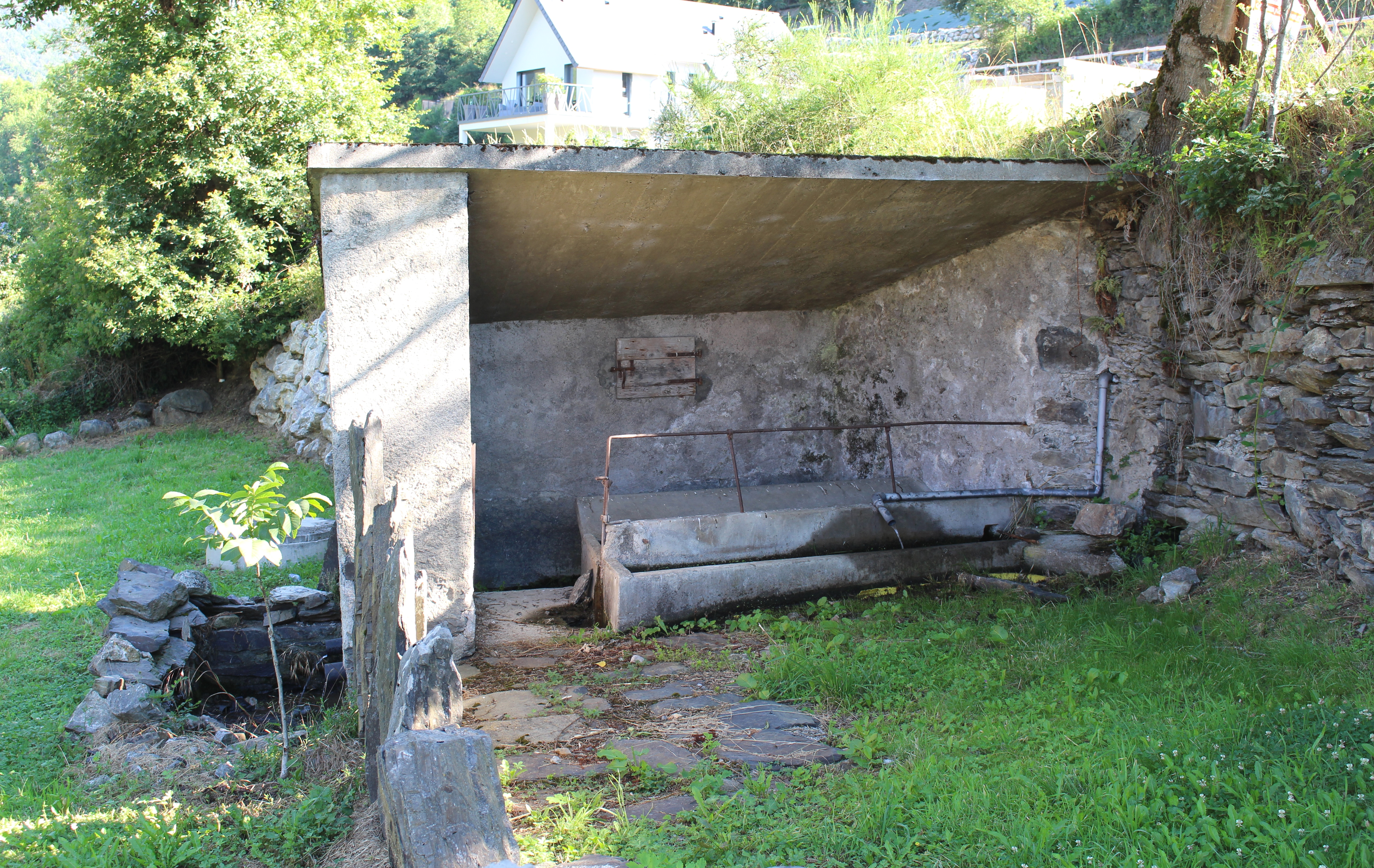 Lavoir de Pailhac (Hautes-Pyrénées)